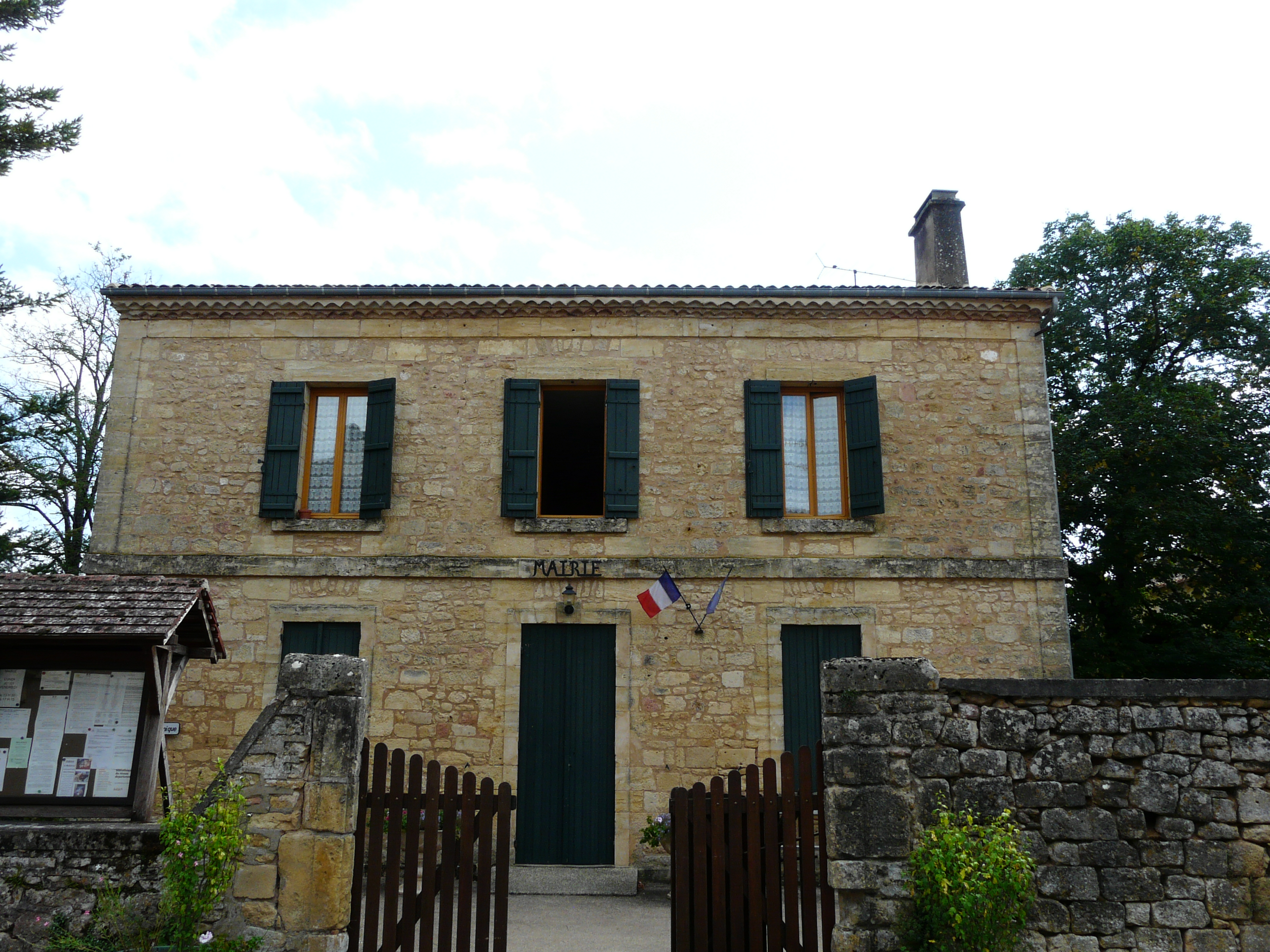 La mairie de Molières, Dordogne, France.